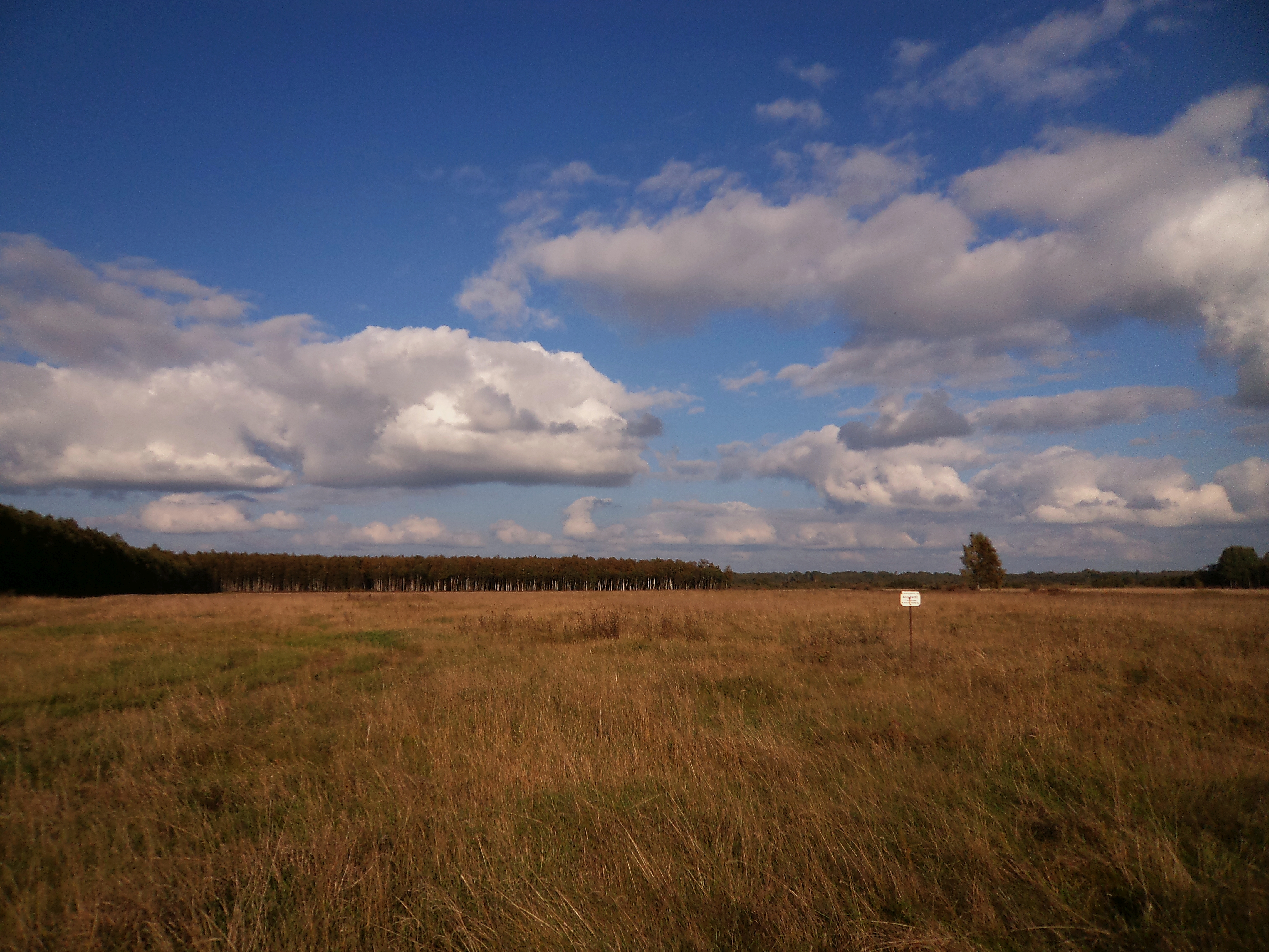 Asulakoht